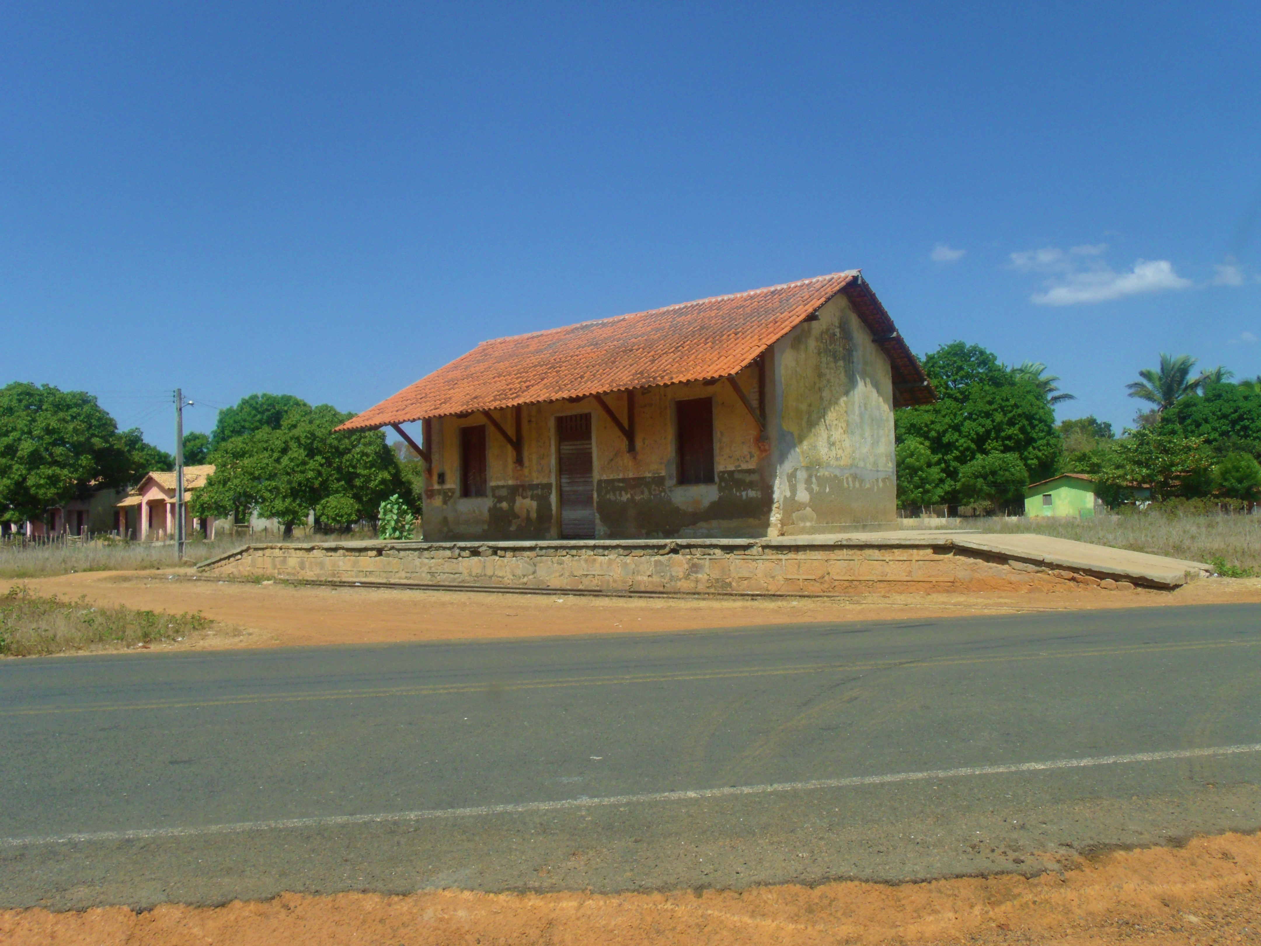 Vista da Estação Ferroviária da Sambaíba já ao escurecer do dia.